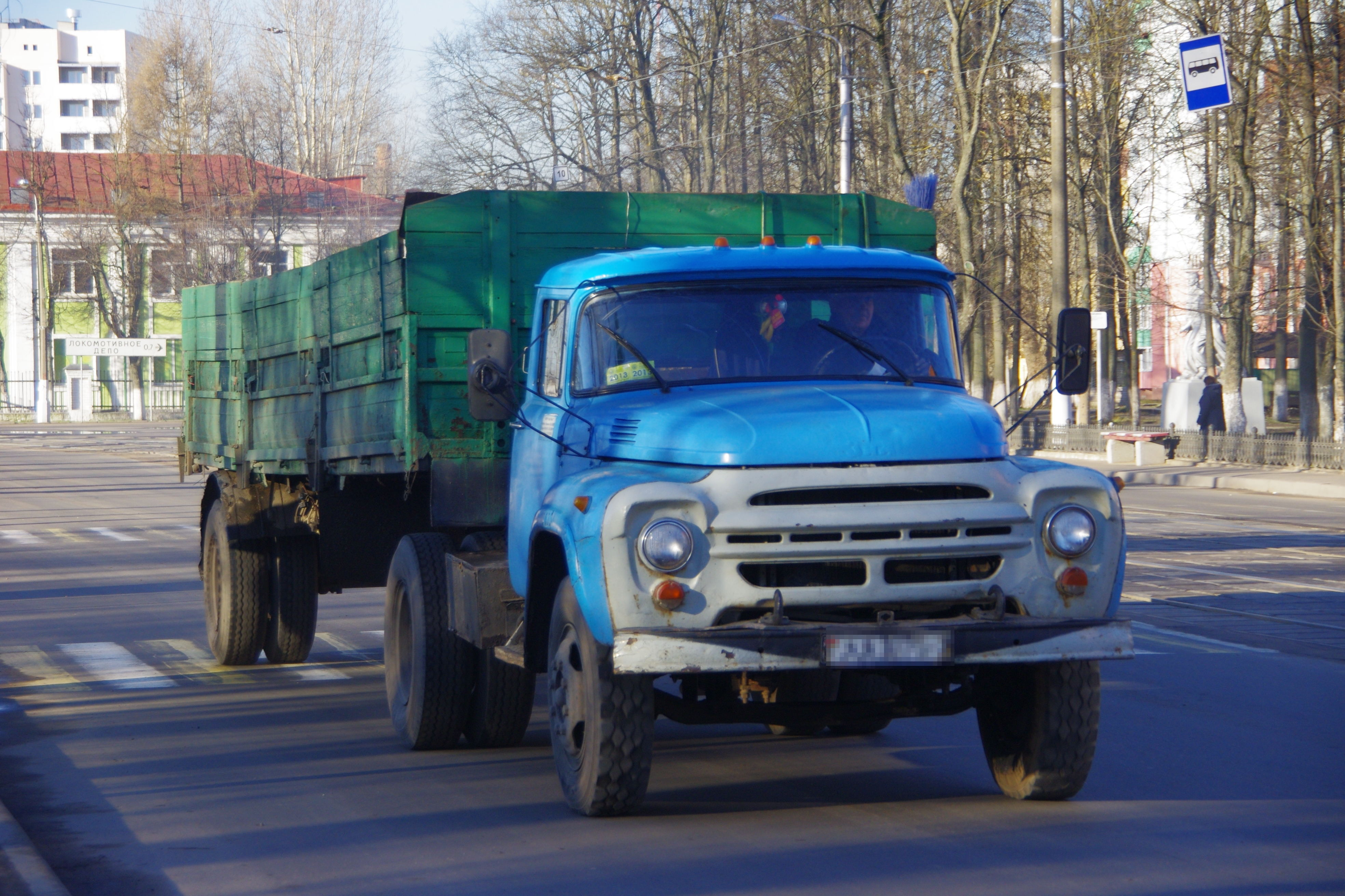 Trucks in city of Vitebsk. --- Снято в один из рабочих дней города Витебска